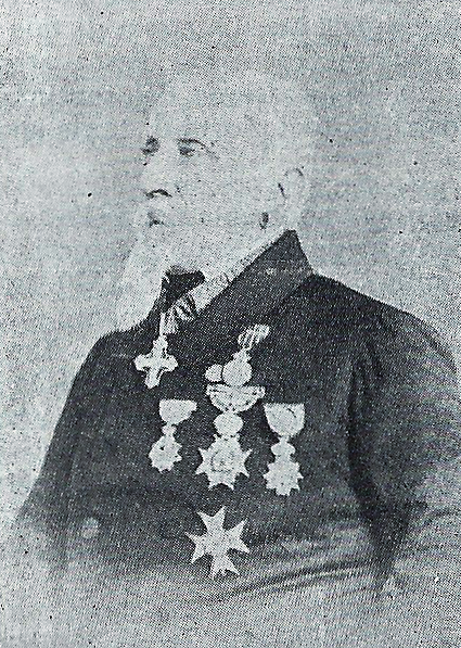 Ottavio Tasca